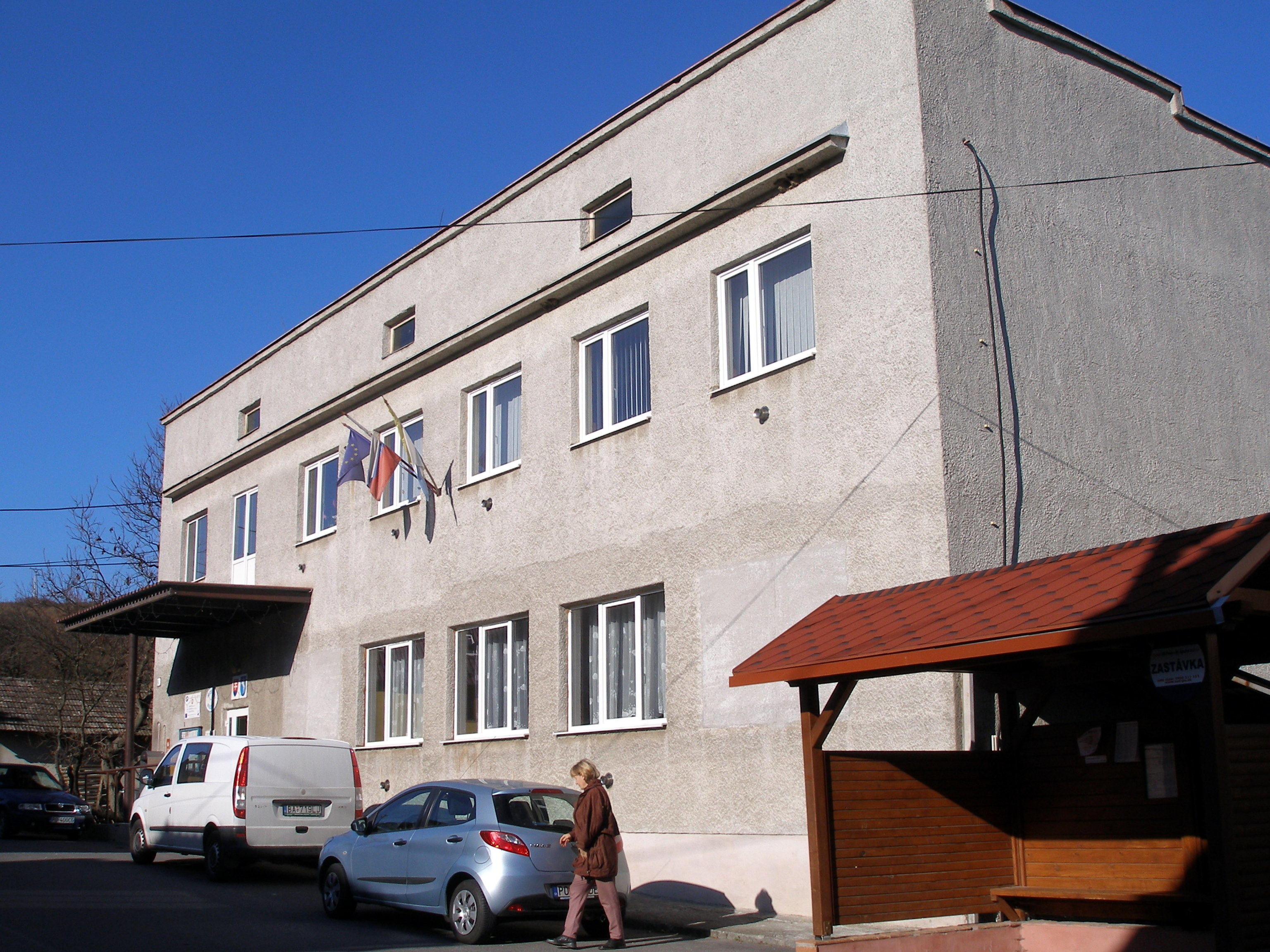 Šarišská obec Miklušovce. Okres Prešov